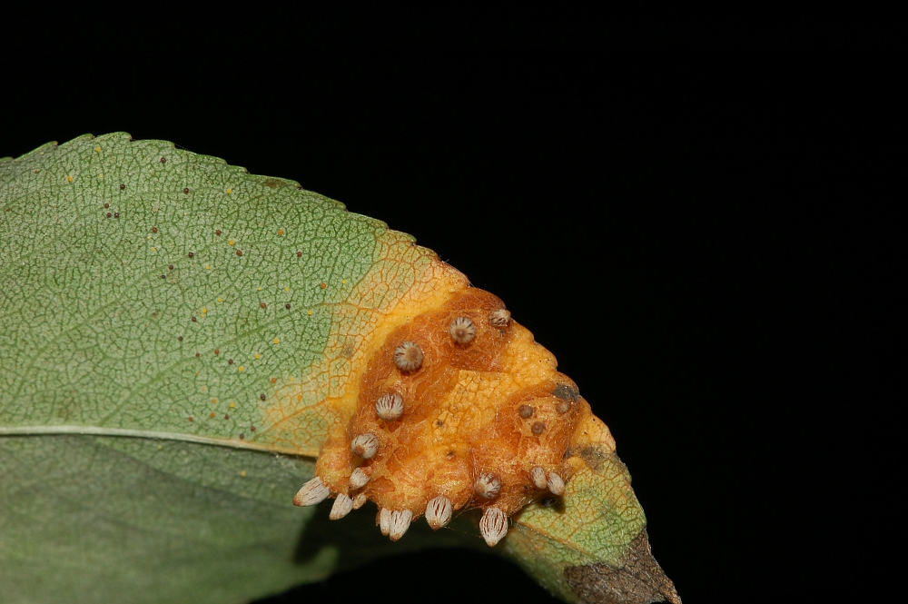 Gymnosporangium sabinae, Birnengitterrost, Frankfurt am Main, Nied, Deutschland, Germany